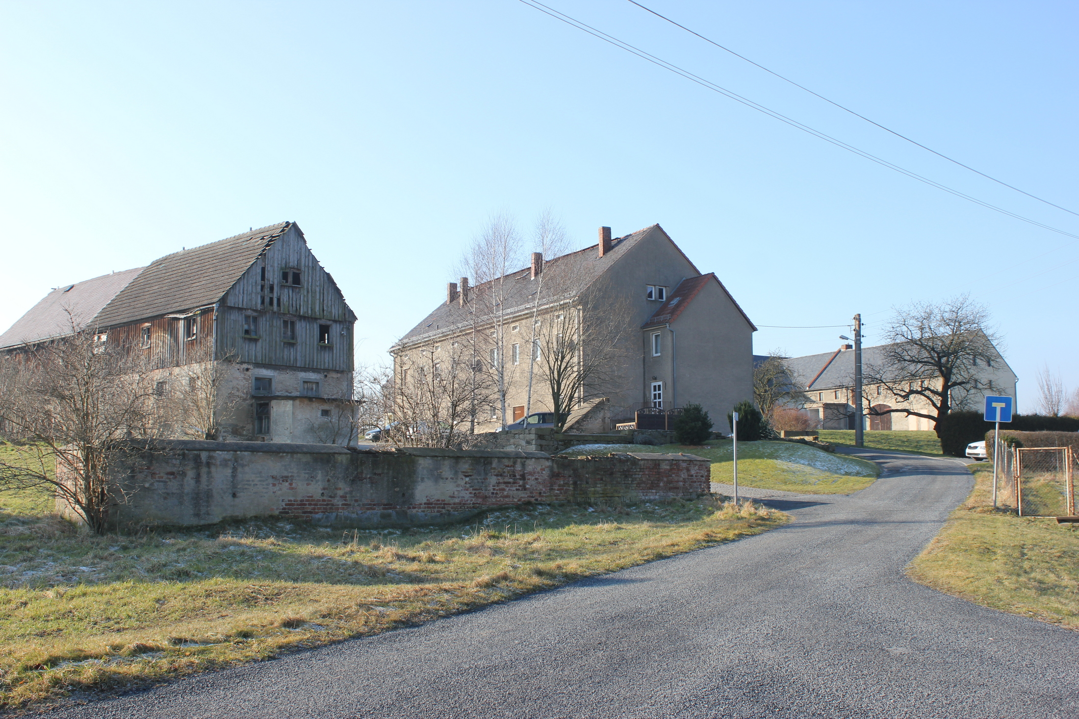 Hornjoserbsce: Burski statow w Žuricach.